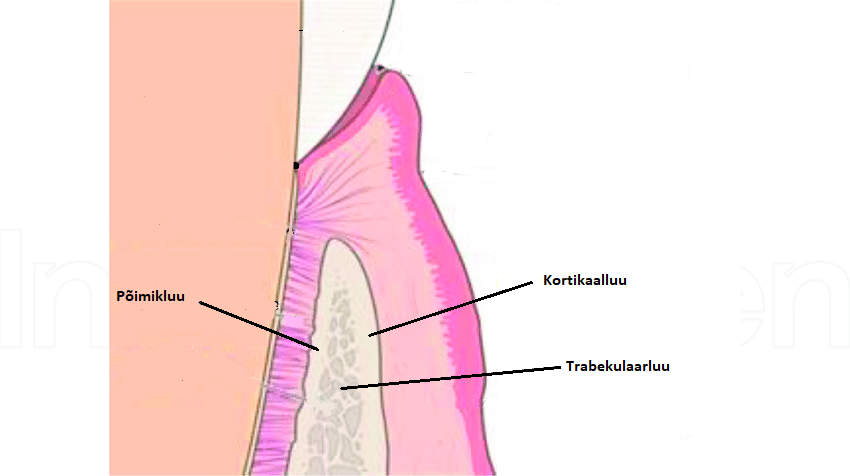 Alveolaarluu